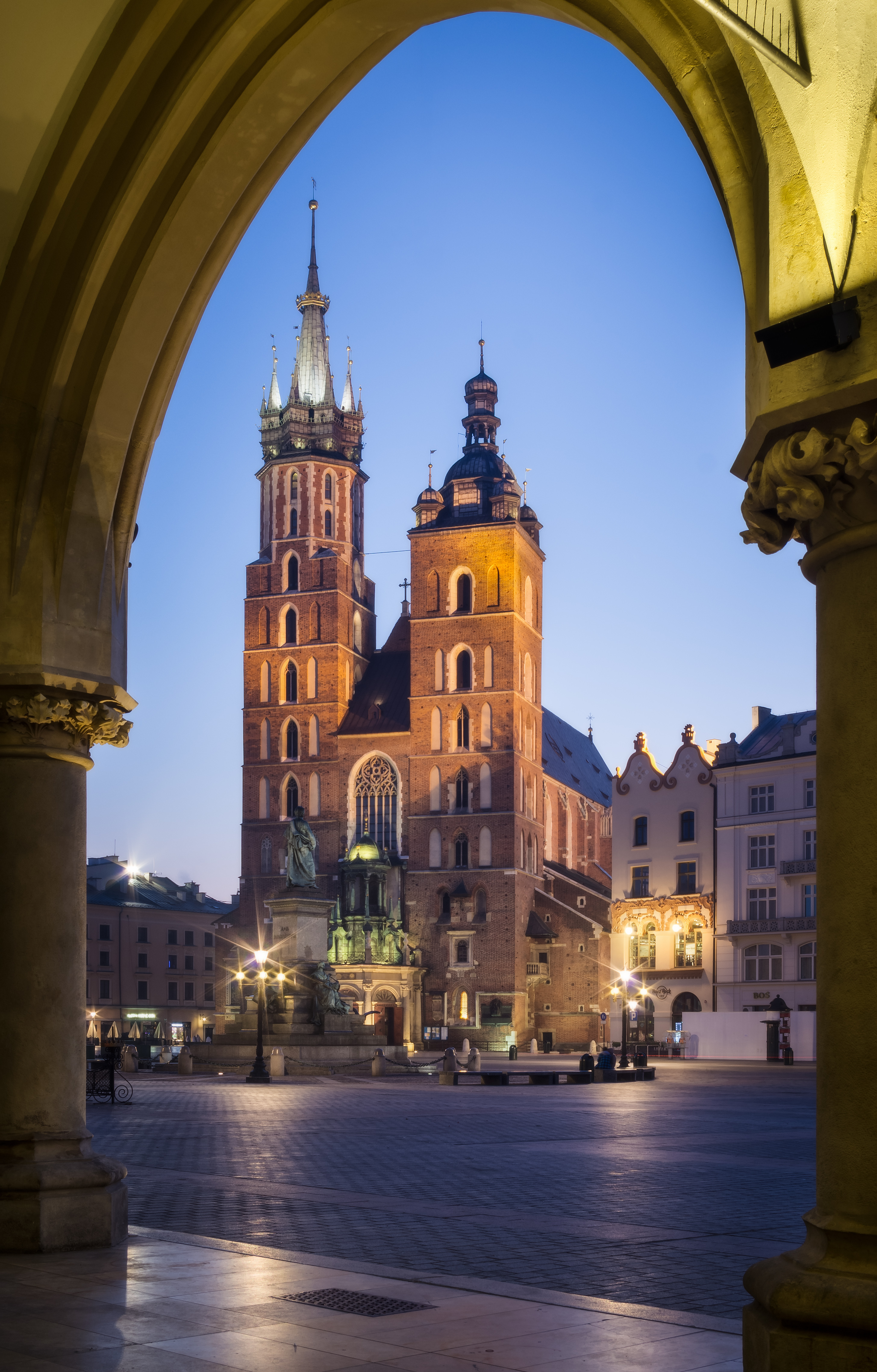 Kraków, kościół par. pw. Wniebowzięcia NMP (Mariacki), XIII/XIV, XIV, XIX